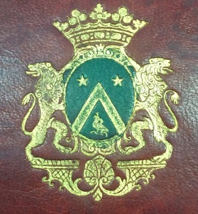 Armoiries du come d'ogny